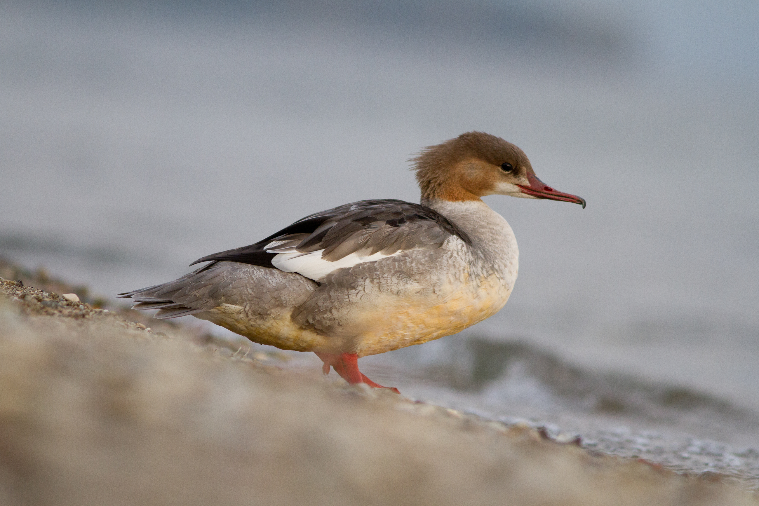 Femelle de harle bièvre (Mergus merganser)